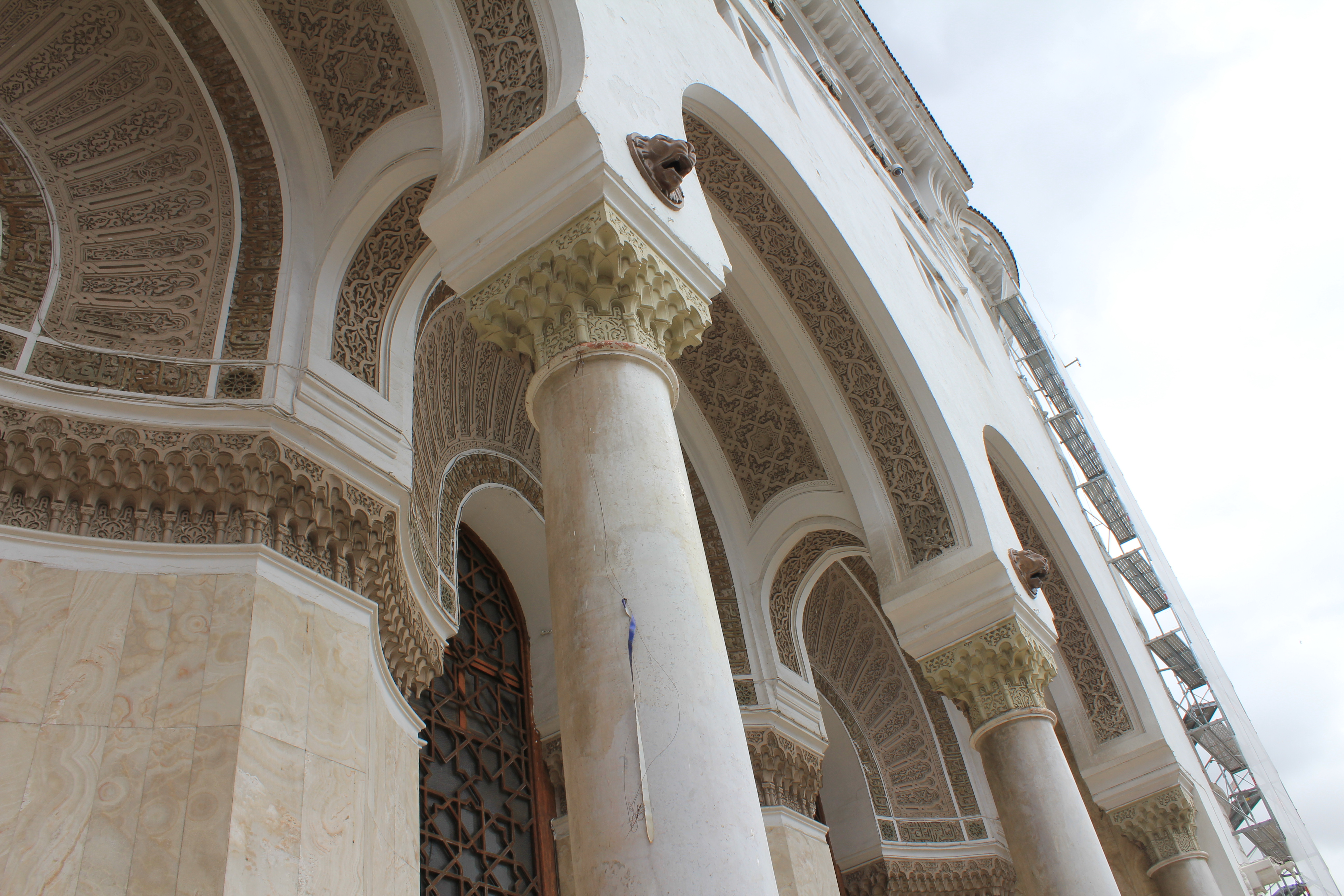 Alger Centre, Algeria